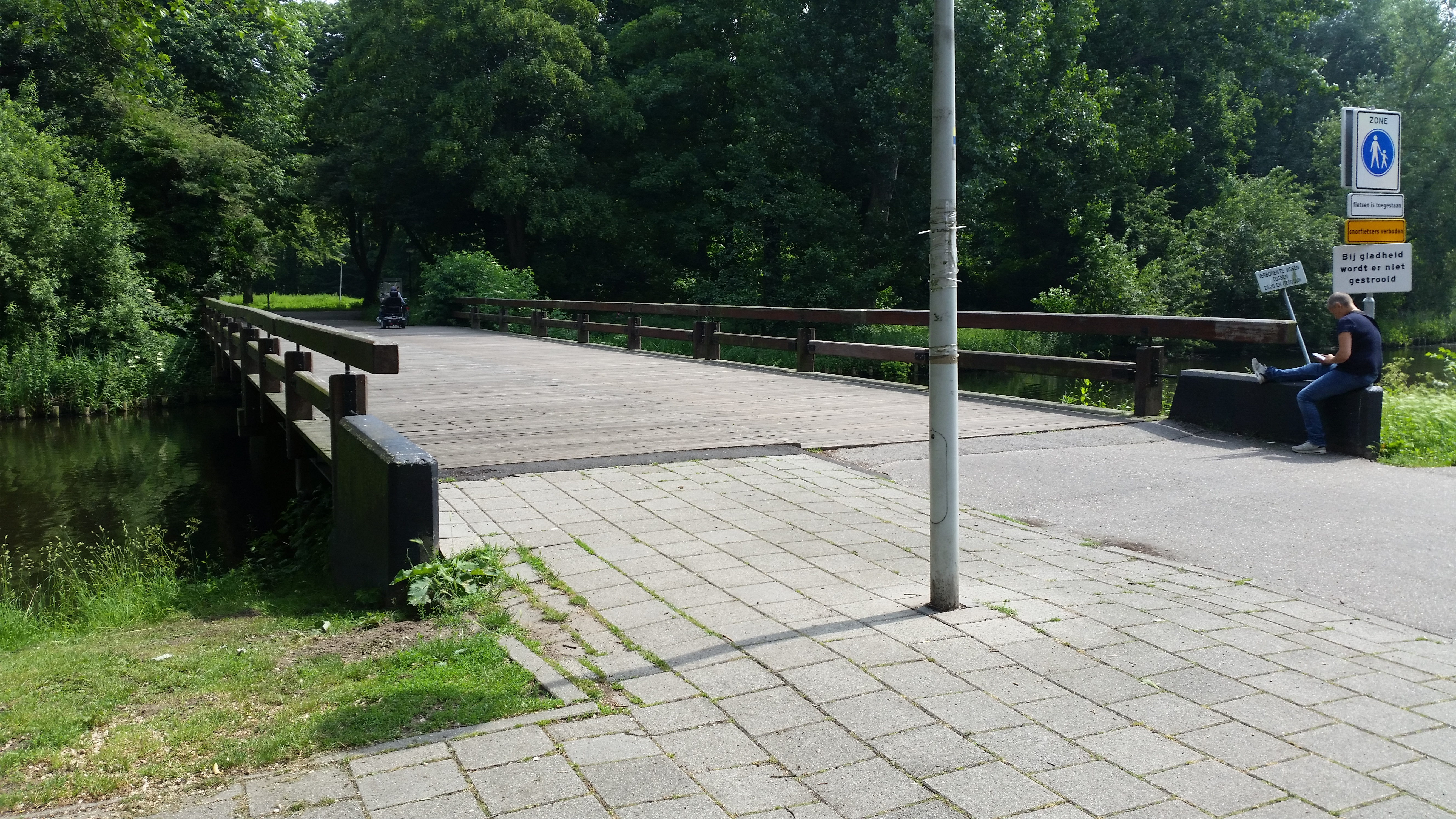 Brug 679 tussen Meer en Vaart/Oeverpad en het Sloterpark, Amsterdam